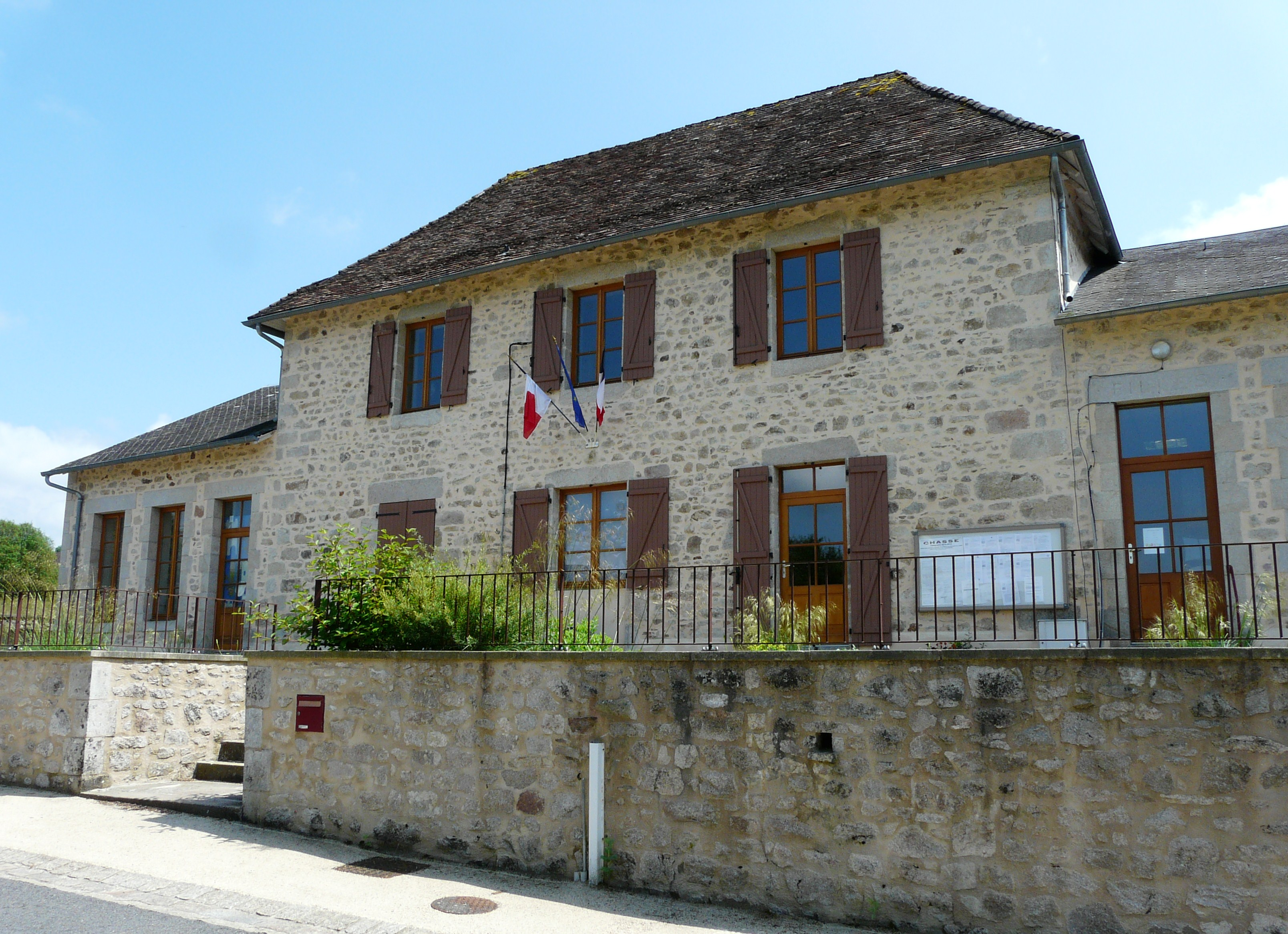 La mairie dans le bourg de Lastours, Rilhac-Lastours, Haute-Vienne, France.